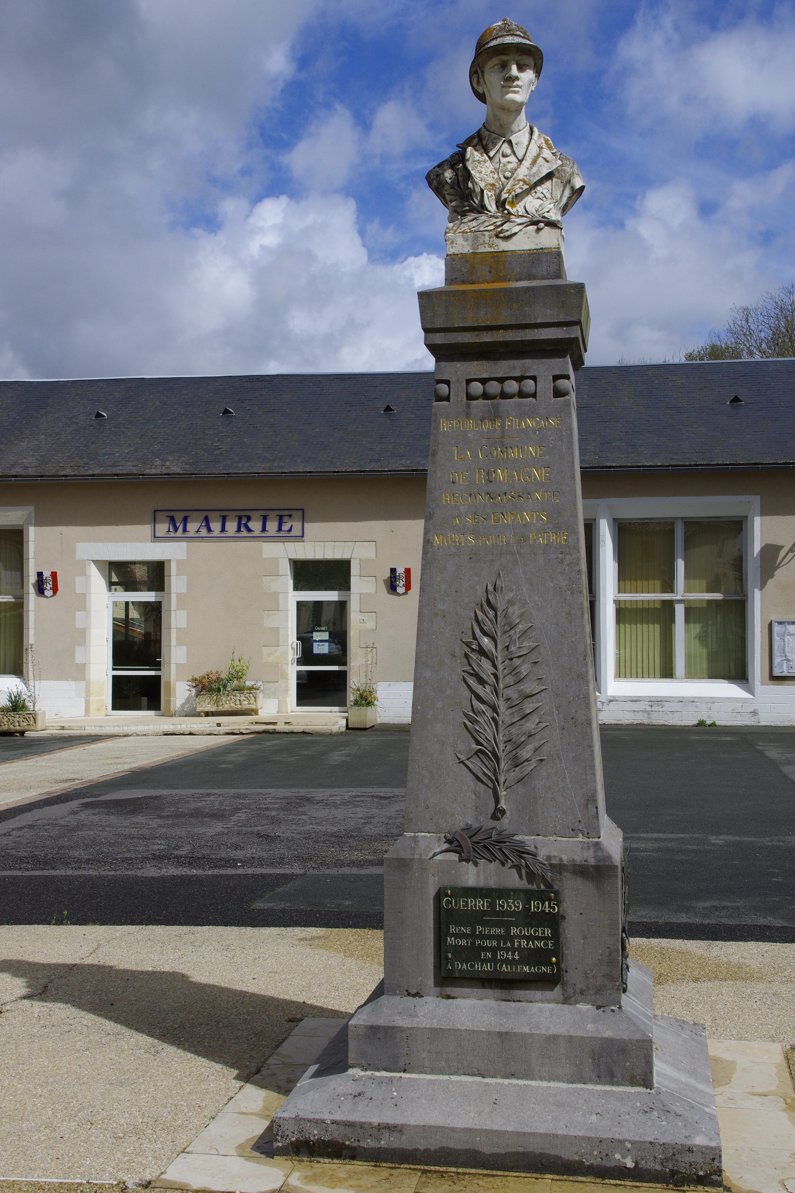 Place du 8-Mai 1945, Romagne, Vienne, France.